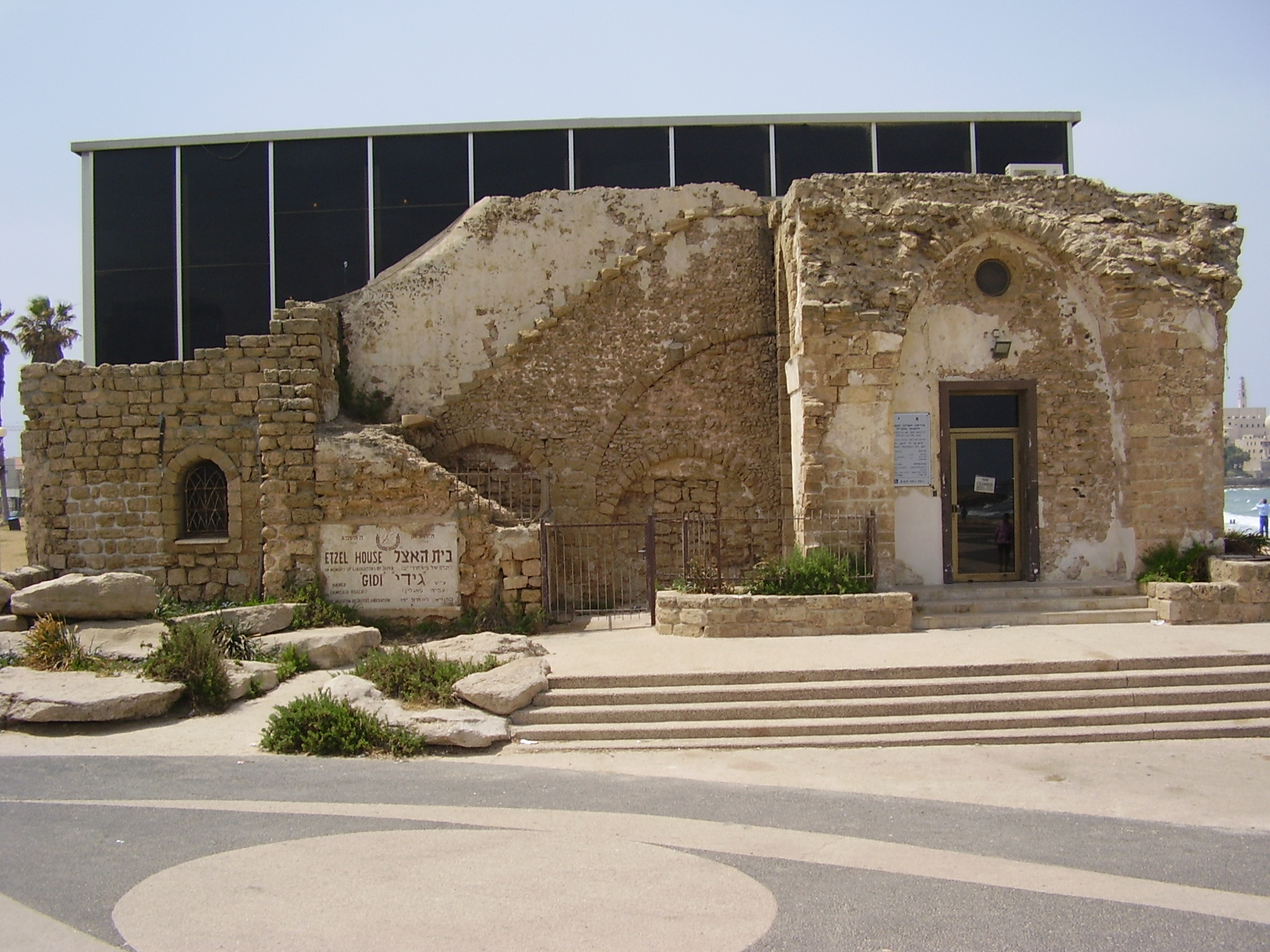 Etzel museum in Tel-Aviv